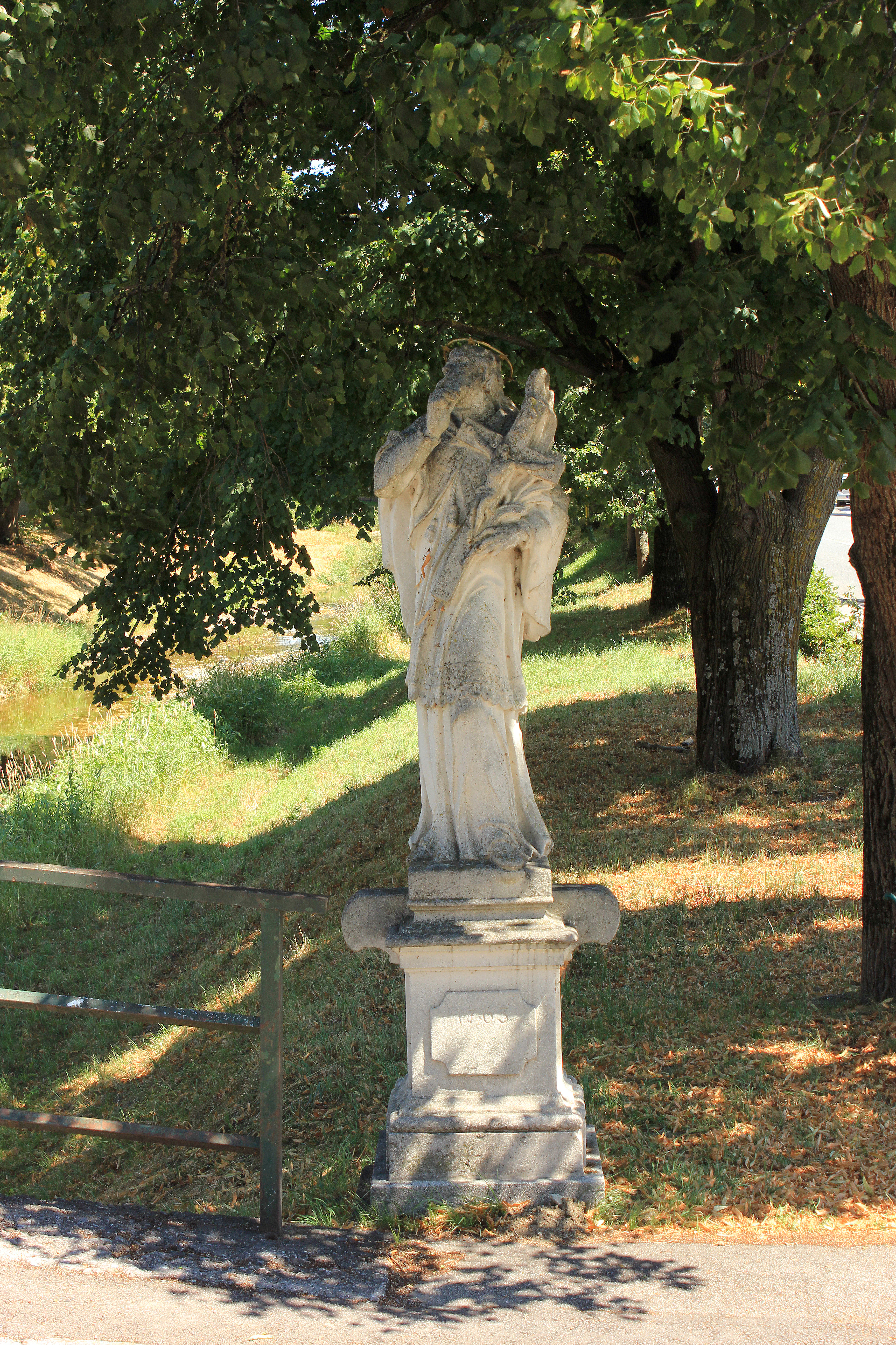 Die Nepomukstatue bei einer Brücke über die Gölsen in Hainfeld im Juli 2015